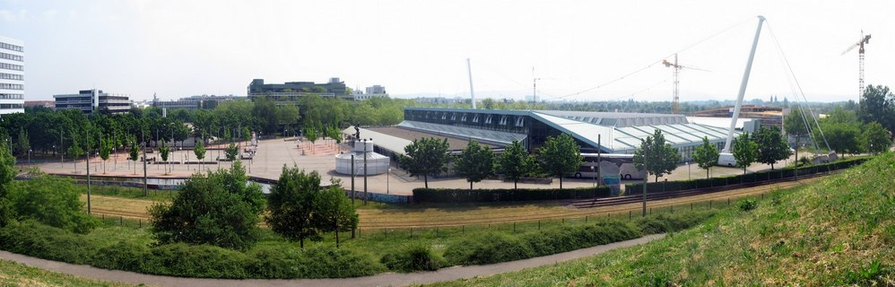 Europahalle